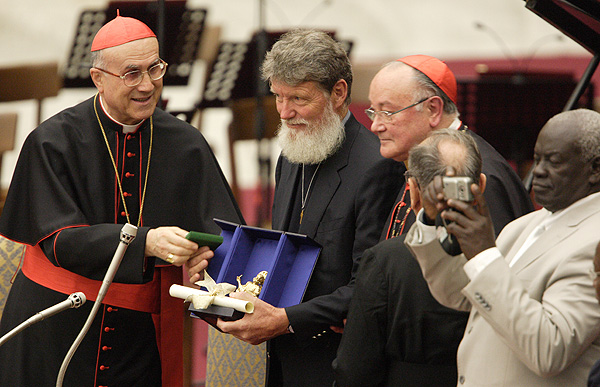 Padre Pedro riceve il premio dal Vaticano